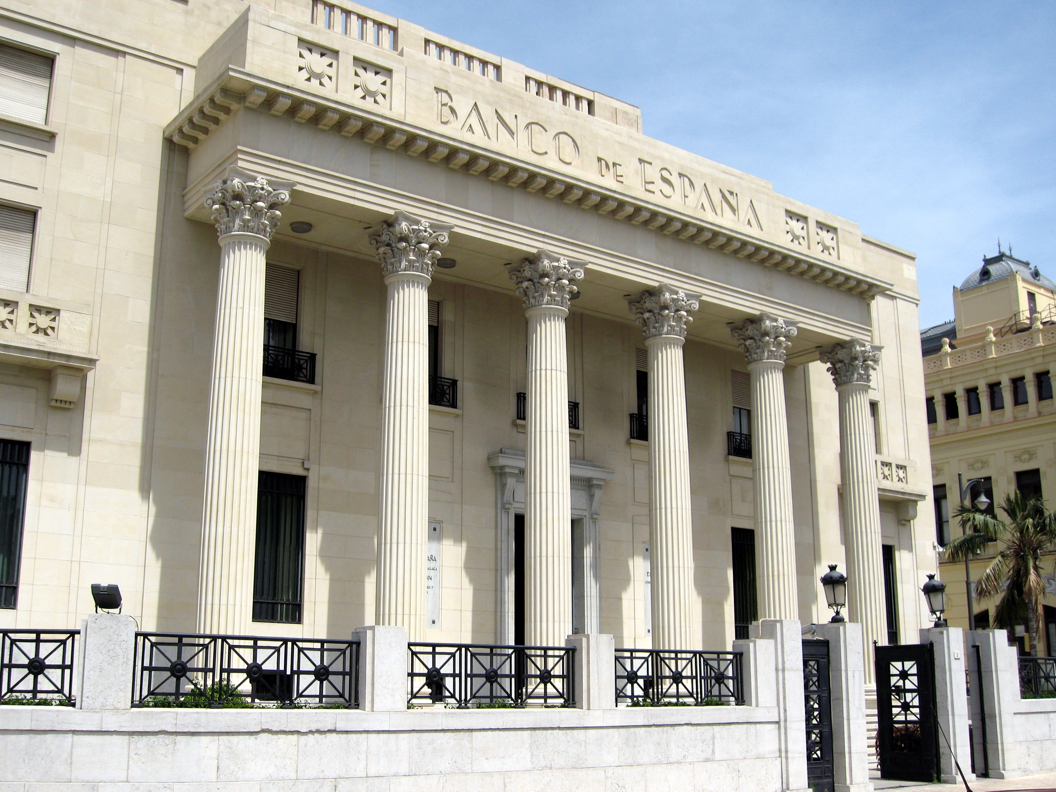 Gebäude der Banco de España in Málaga, Andalusien, Spanien